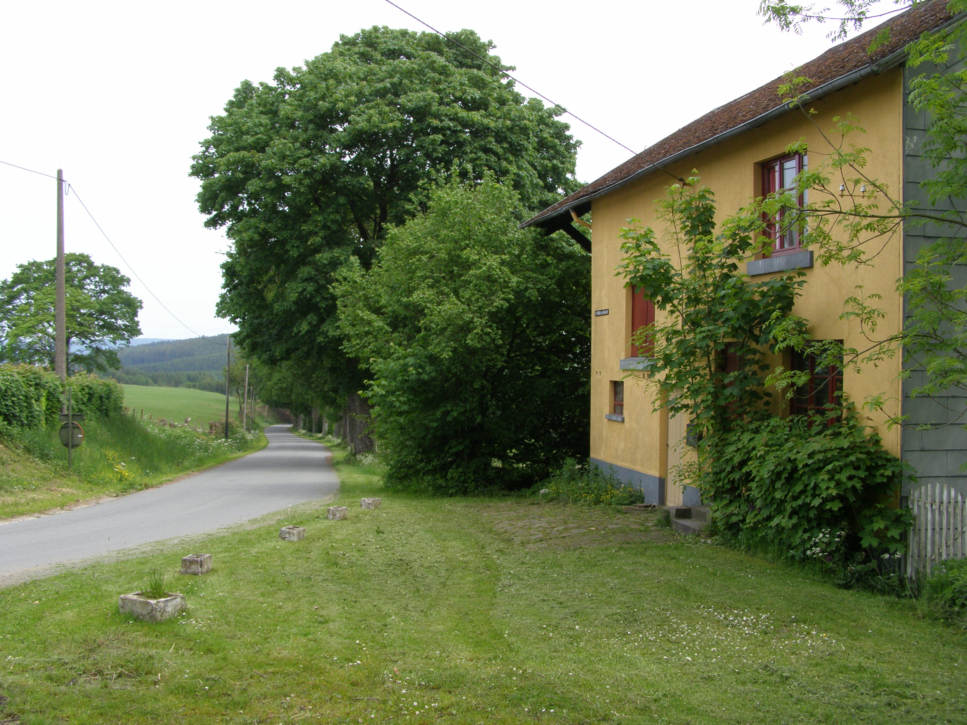 eigen werk